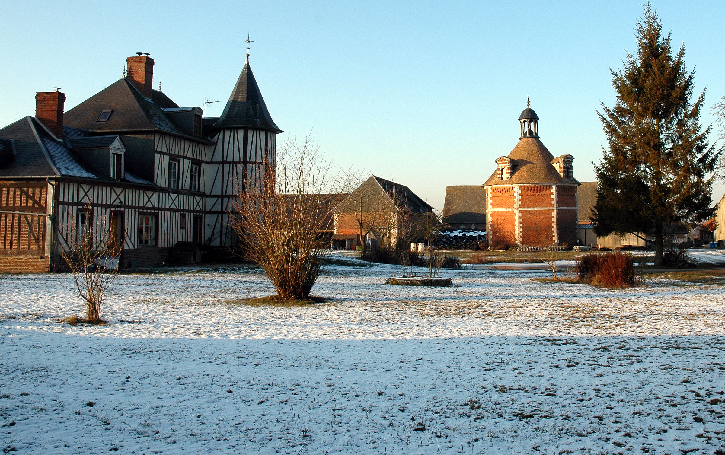 Bourgtheroulde-Infreville (Eure, France). La ferme du Logis avec son colombier.